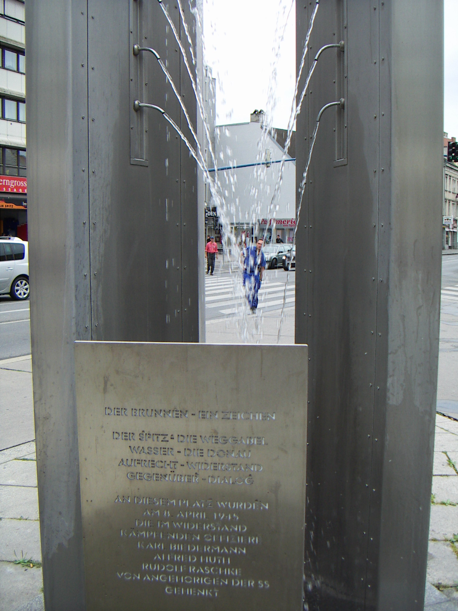 Denkmal Brunnen Zeichen, Weggabel Brünner Str und Prager Str, Platz Am Spitz Floridsdorf Wien, Karl Biedermann, Alfred Huth, Rudolf Raschke